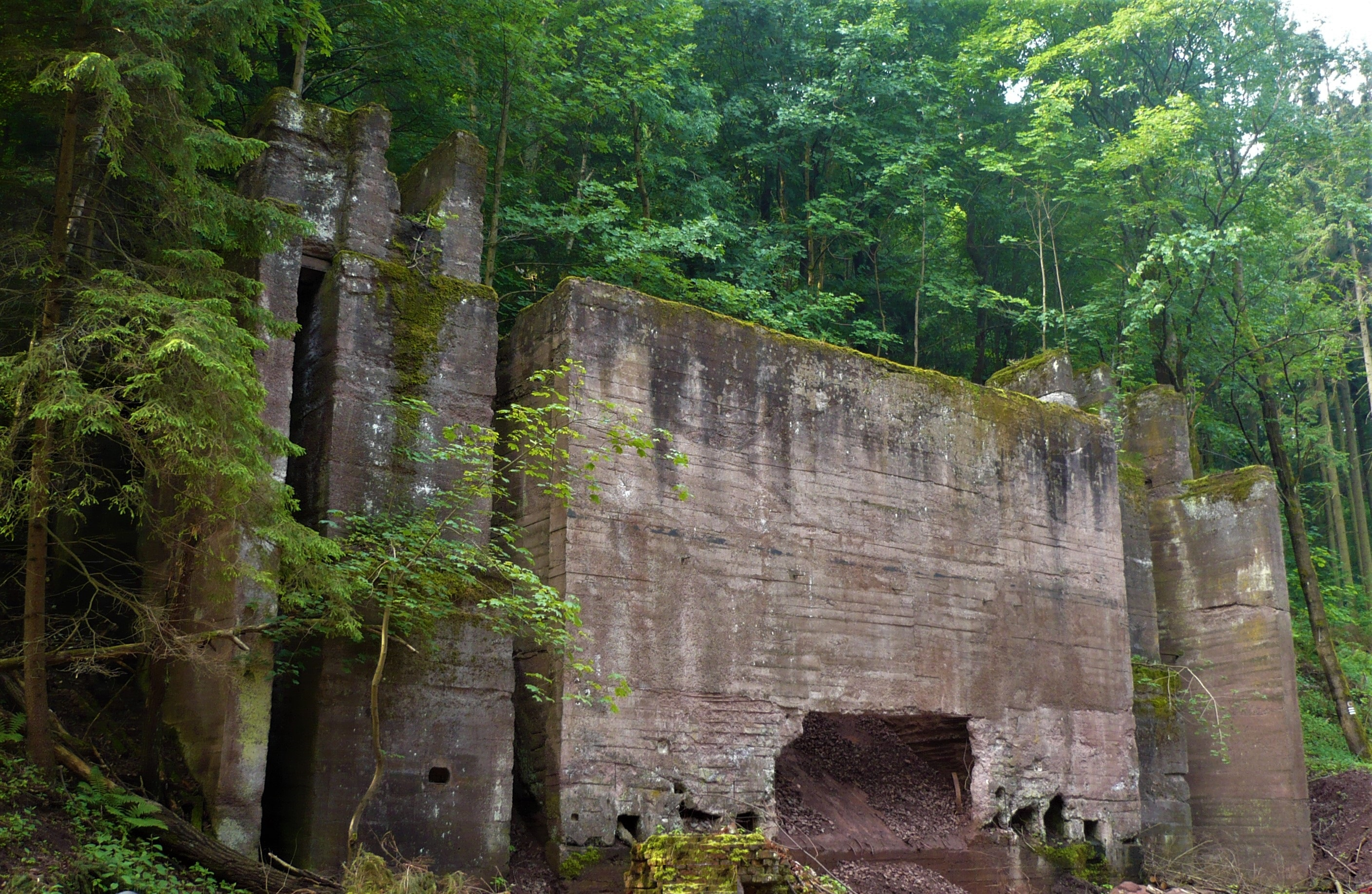 Włodzicka Góra